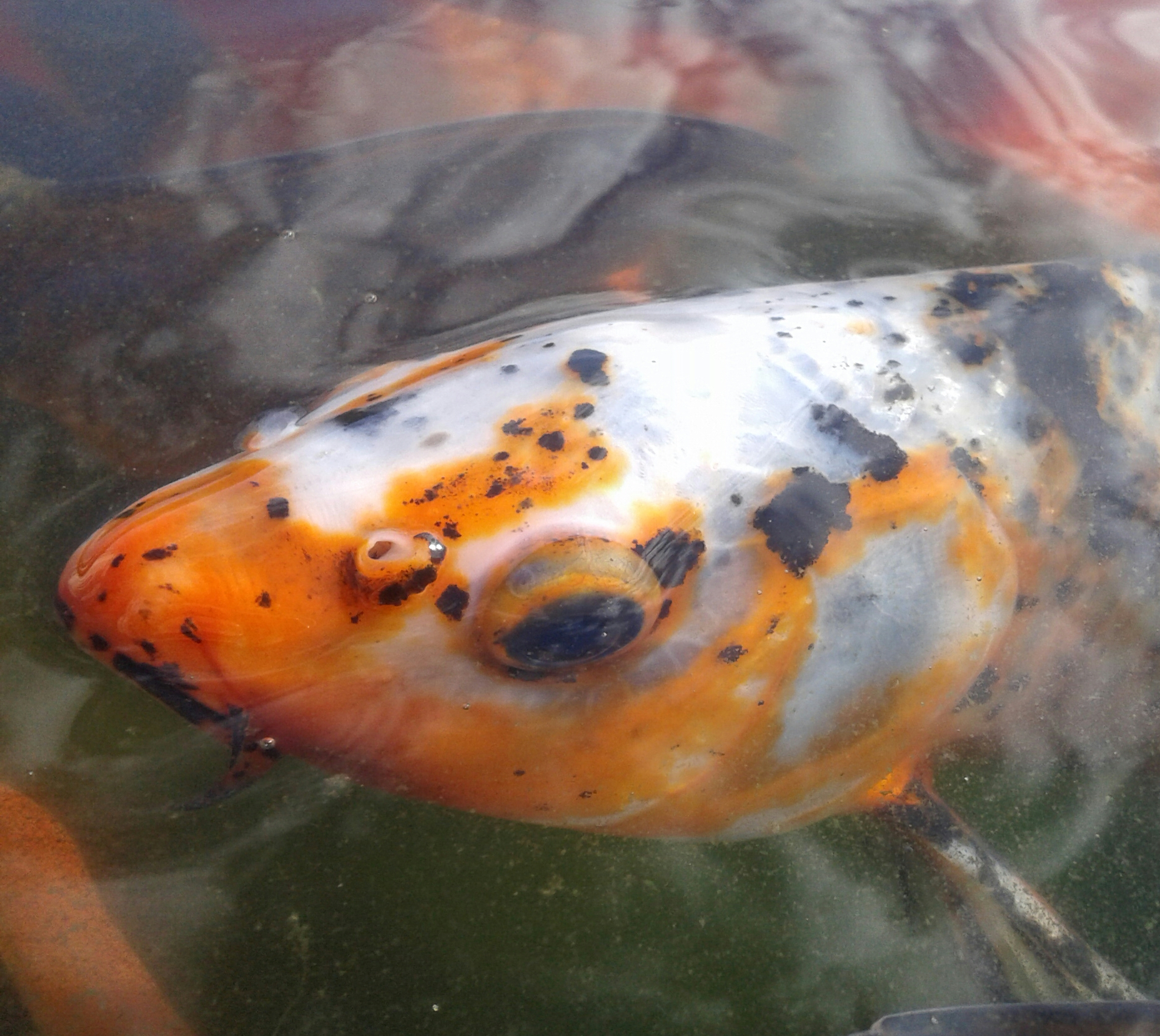 El momento en el que con el pez nos miramos y me di cuenta de la importancia que merece el cuidado de todos los seres vivos que nos rodean.